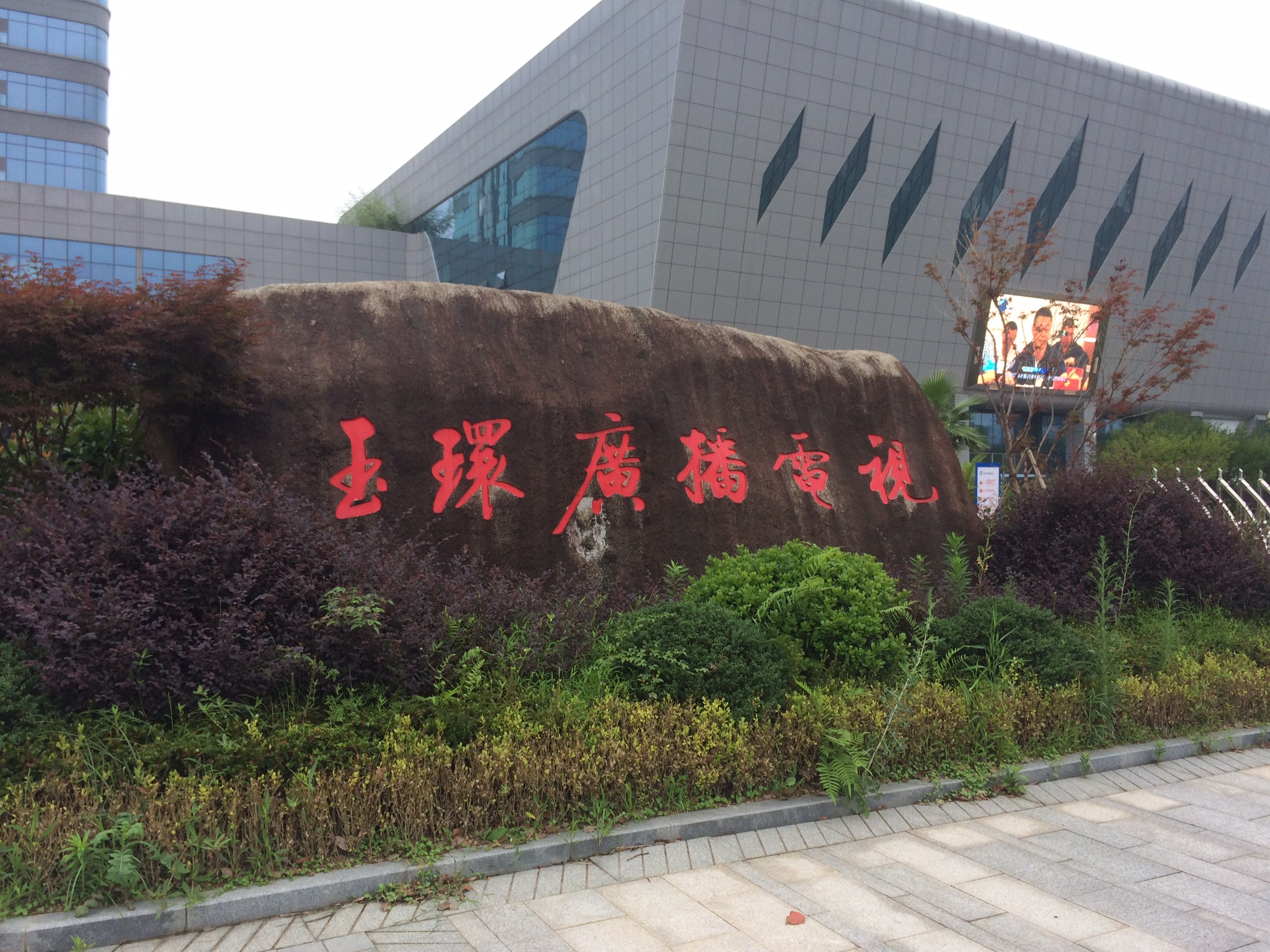 中文（中国大陆）: 玉环市传媒中心前的石头